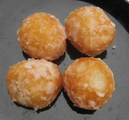 ไข่หงส์